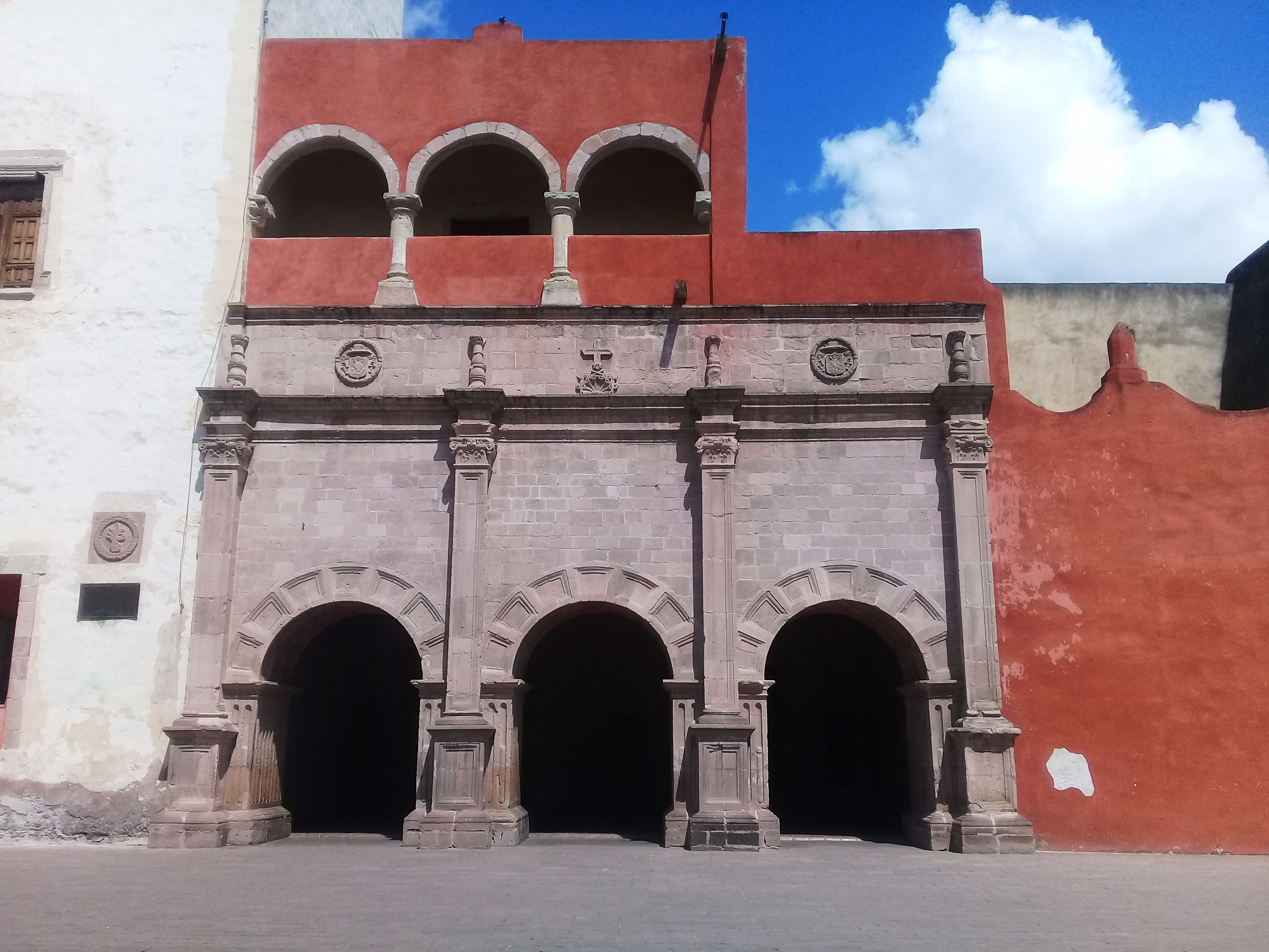 Templo y exconvento de San Nicolás de Tolentino (Actopan).